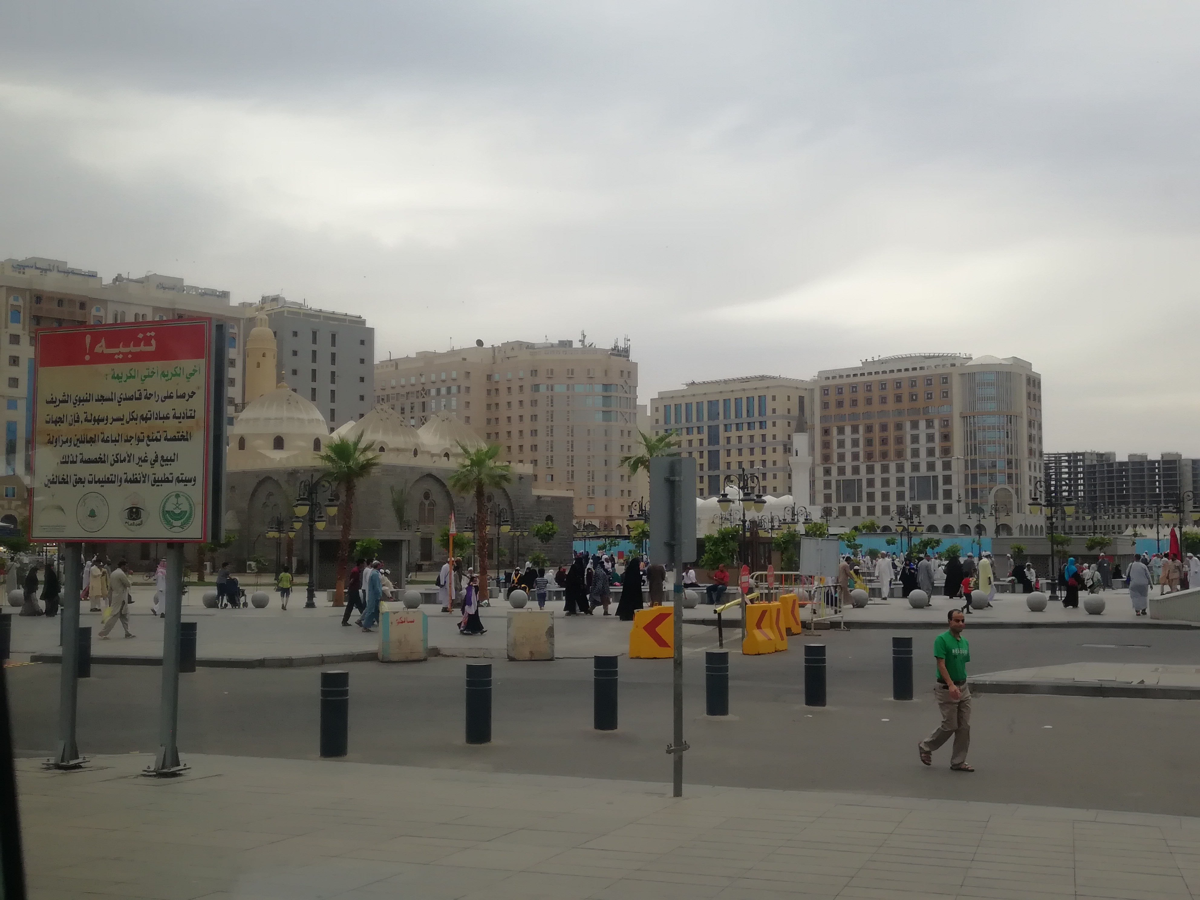 al-Madinah al-Munawarah Ghamama mosque, Abu Bakr musalla mosquer, Omar bin al-Khattab mosque, Madina Market, & Eid Musalla.